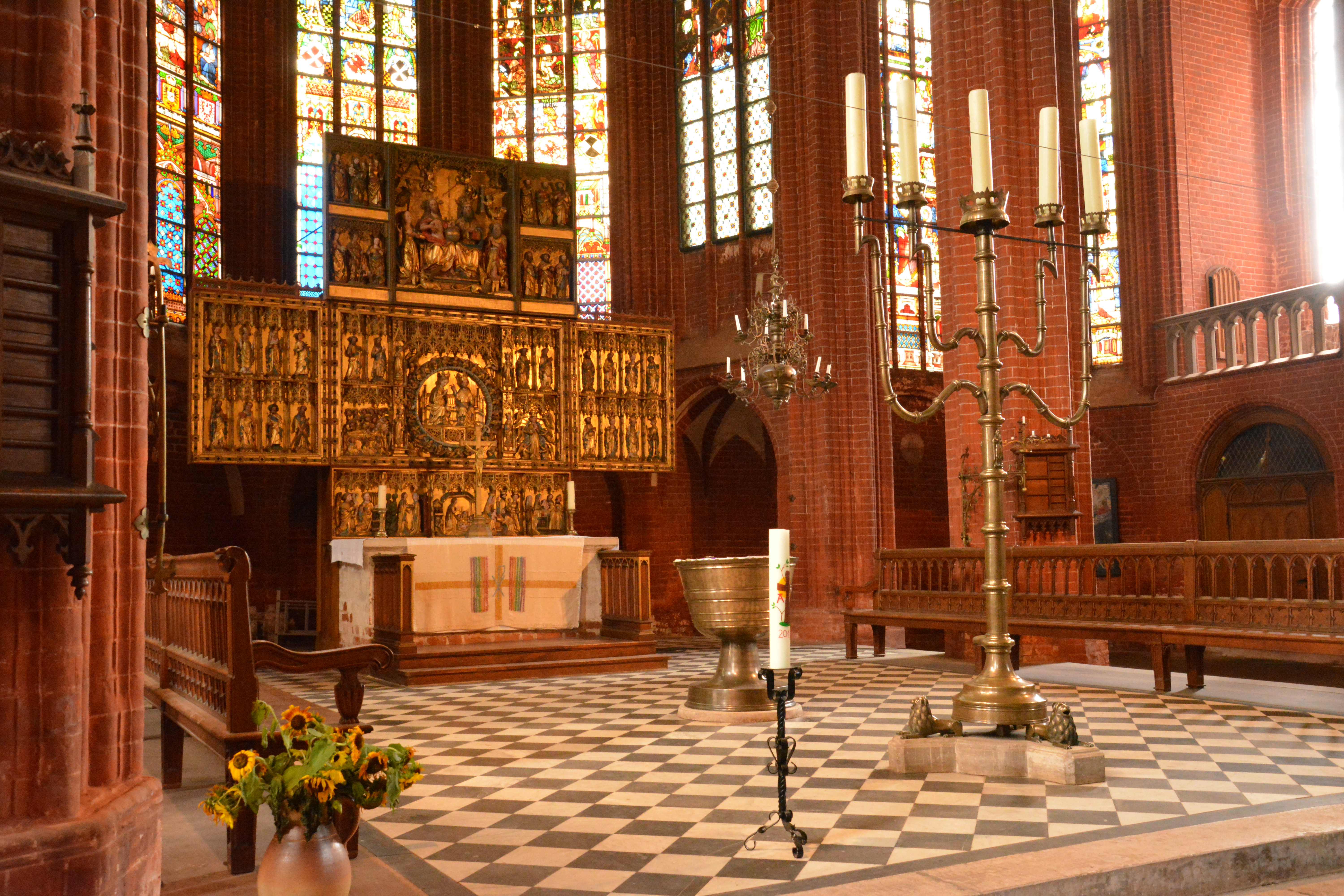 St. Johannis Werben Bronzeleuchter und Altar